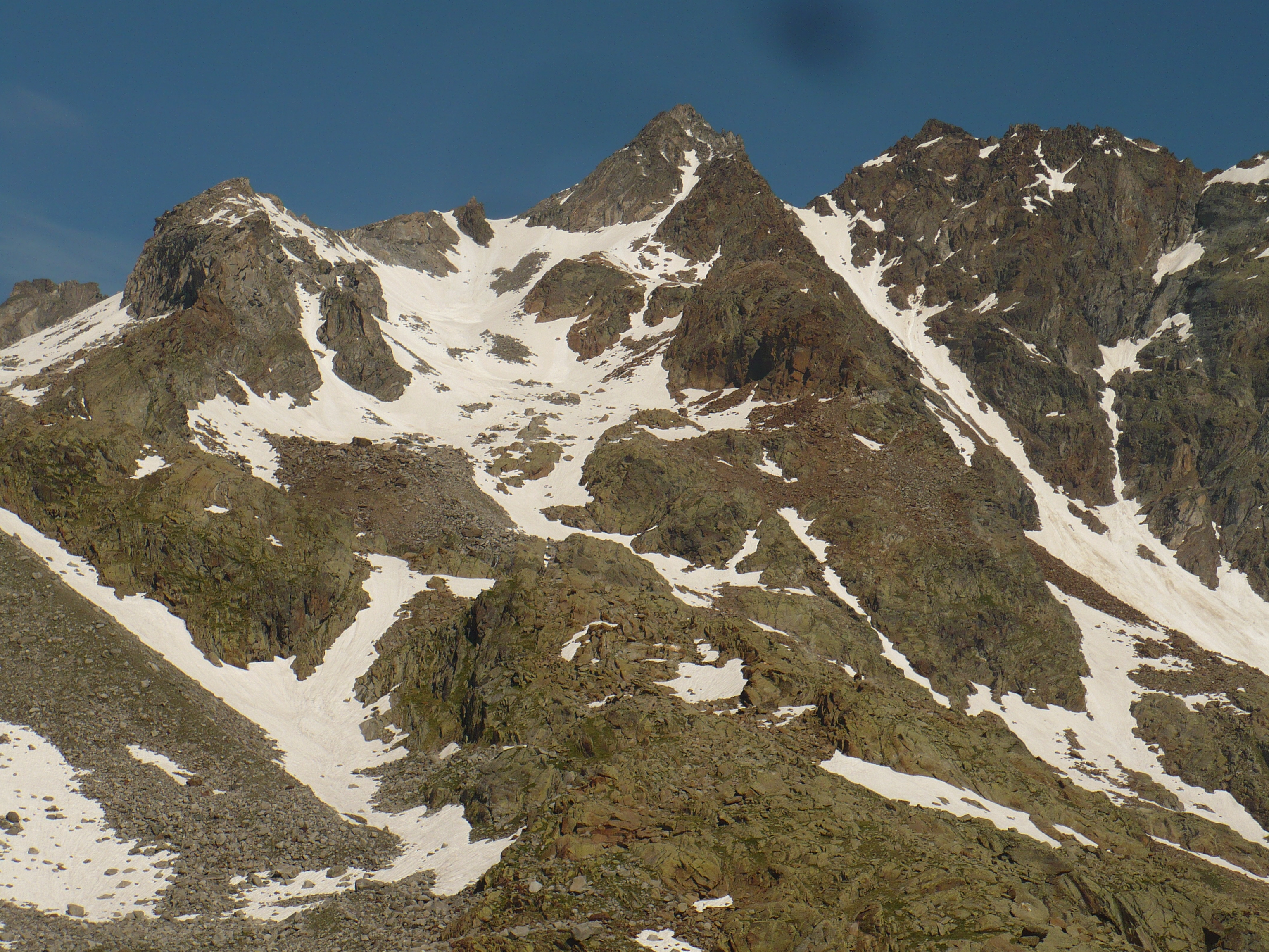 Punta delle Sengie - Versante piemontese - Massiccio del Gran Paradiso - Alpi Graie